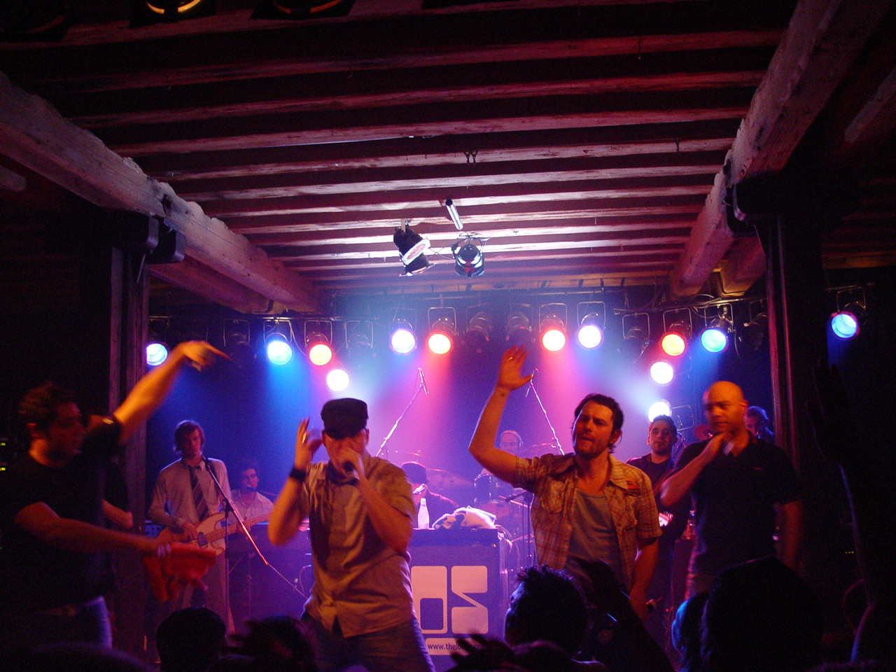 Radio 200000 im Salzhaus, Winterthur (Frühjar 2006)